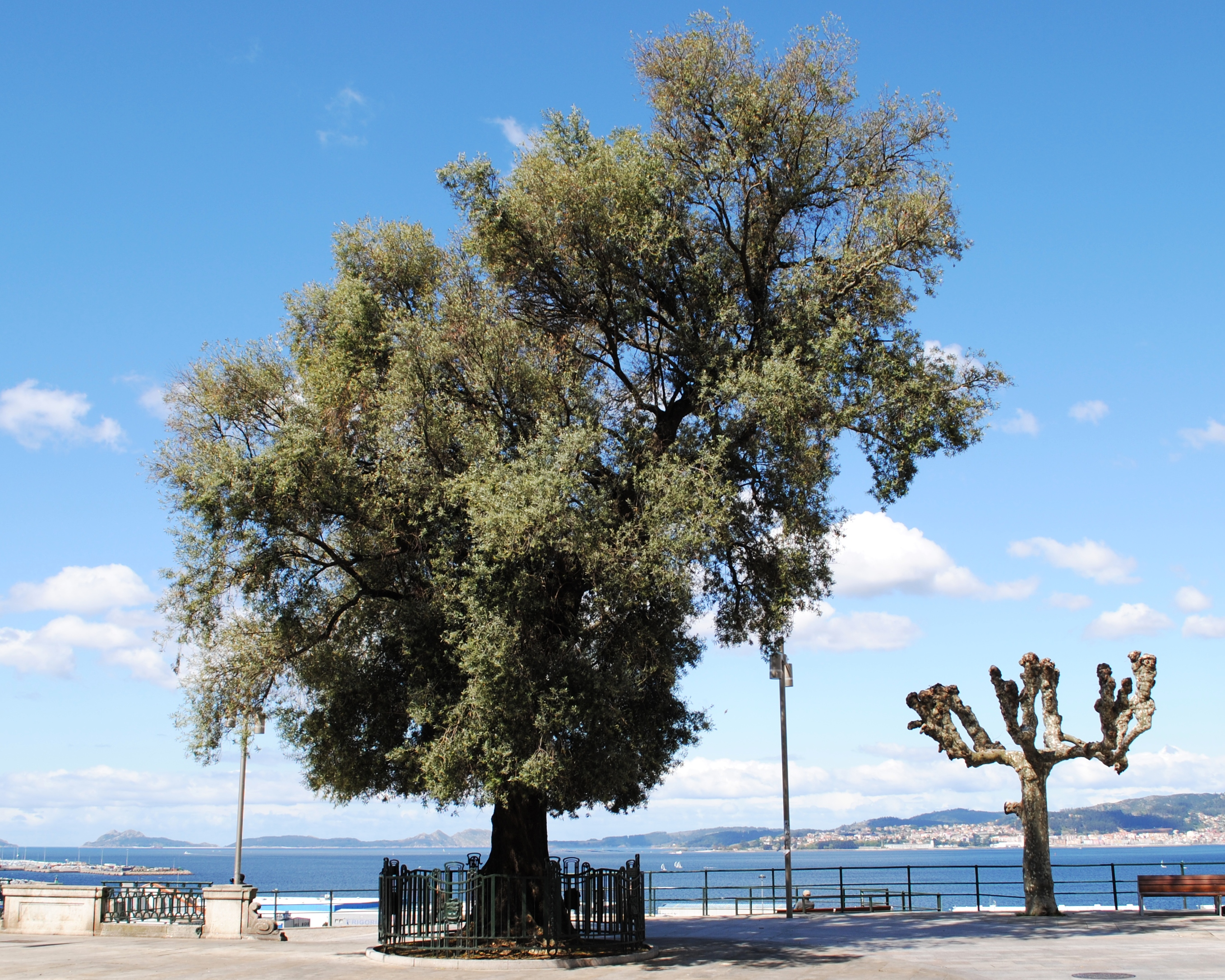 Oliveira, Vigo, Paseo de Alfonso XII